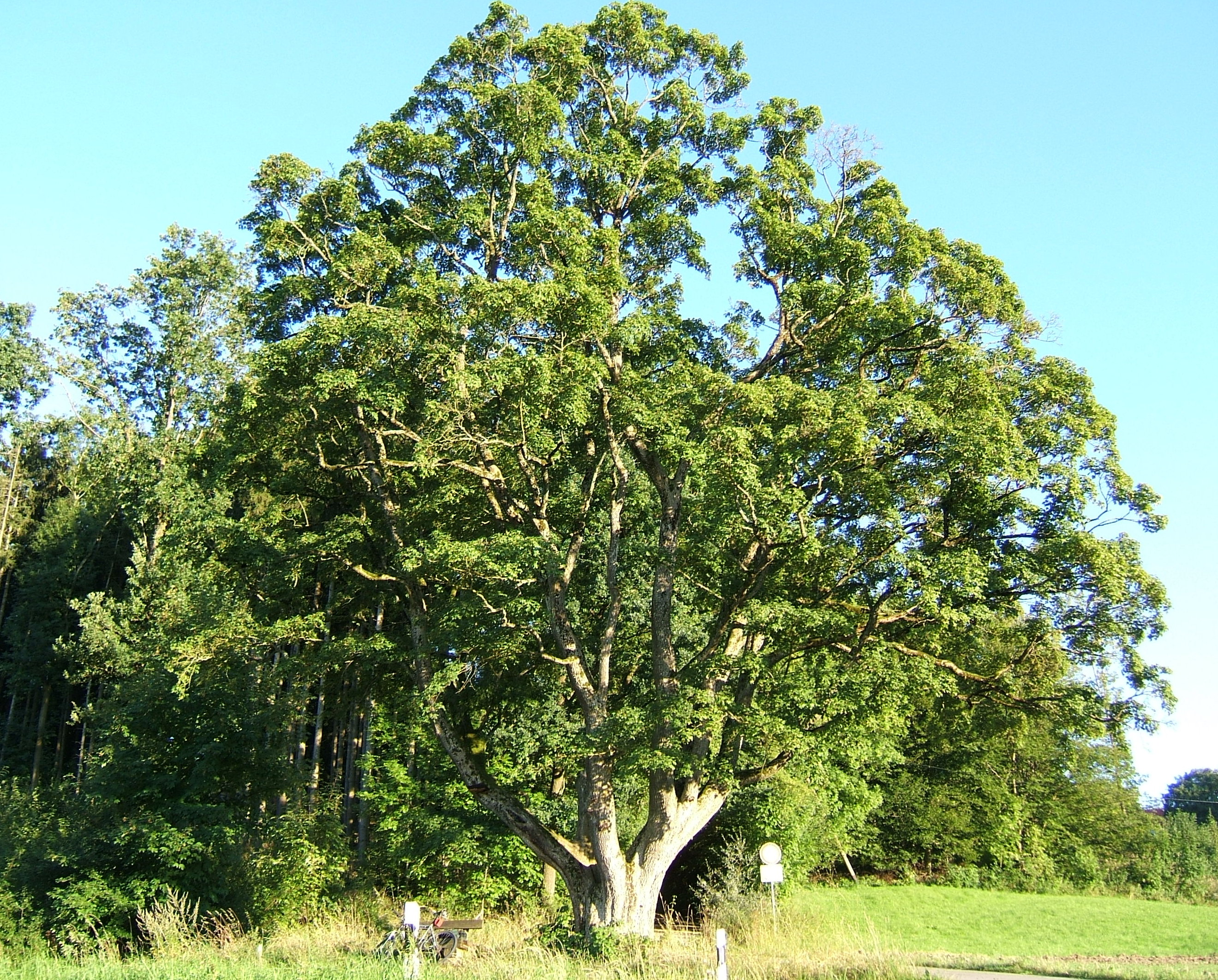 Feldahorn (Acer campestre) bei Haindlfing (Landkreis Freising), mit einem Stammumfang von ca. 3,60 m einer der stärksten Feldahorne Deutschlands